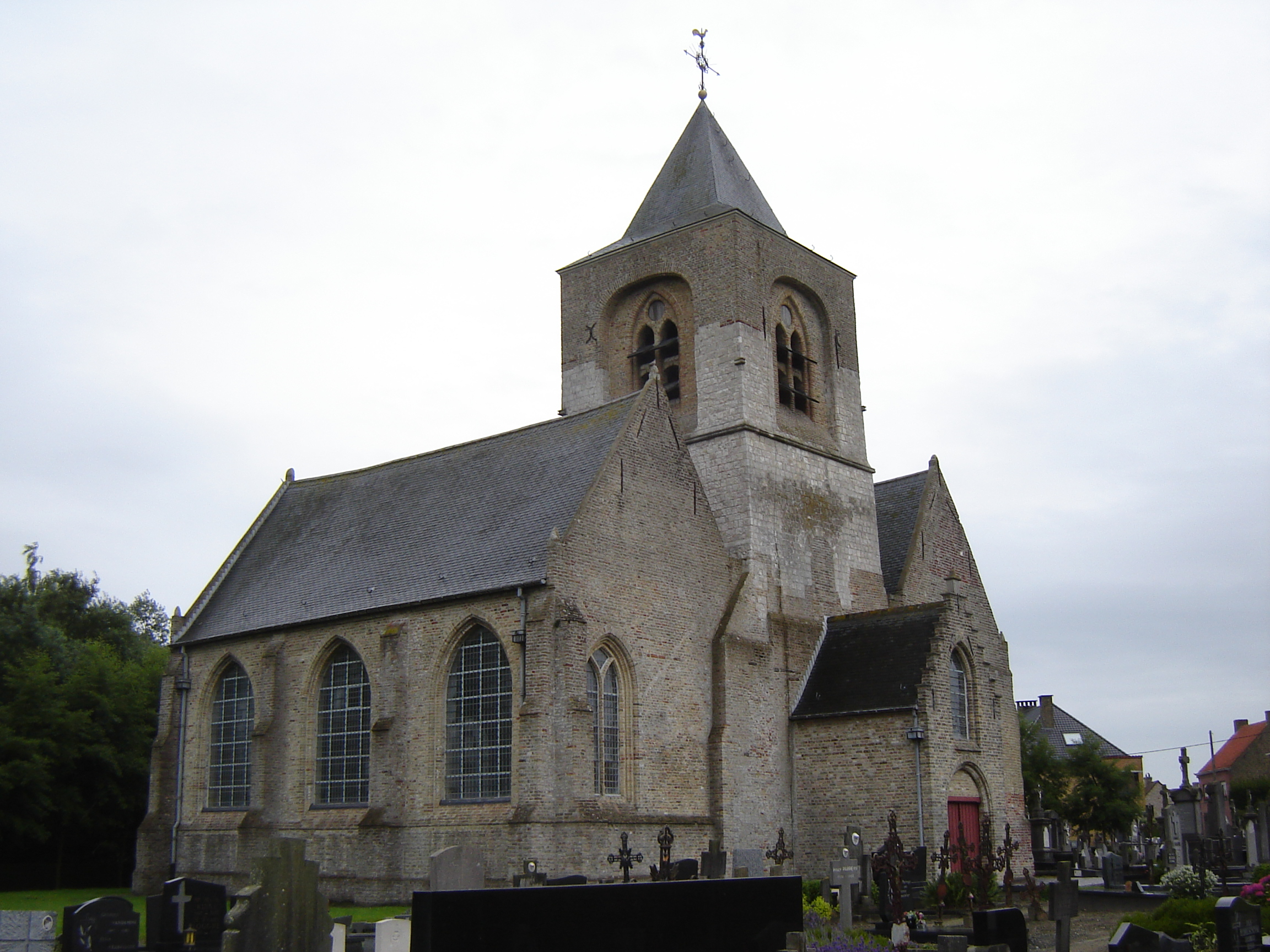 Sint-Laurentiuskerk in Steenkerke. Church of Saint Lawrence in Steenkerke, Veurne, West Flanders, Belgium